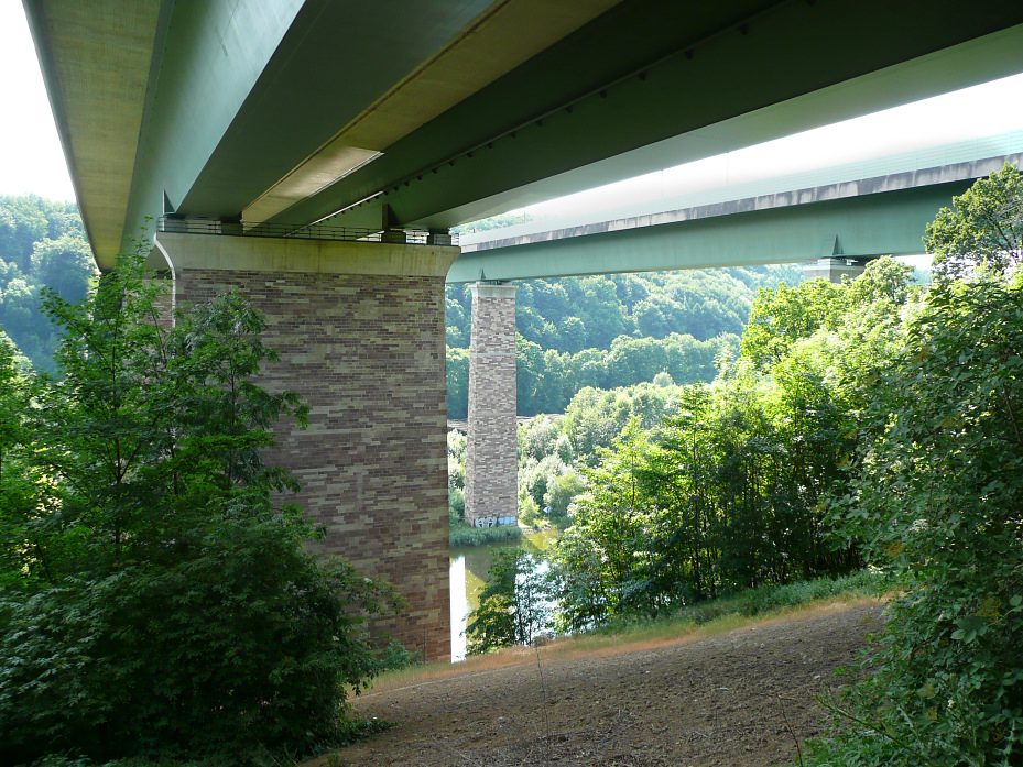 Werratalbrücke Hedemünden